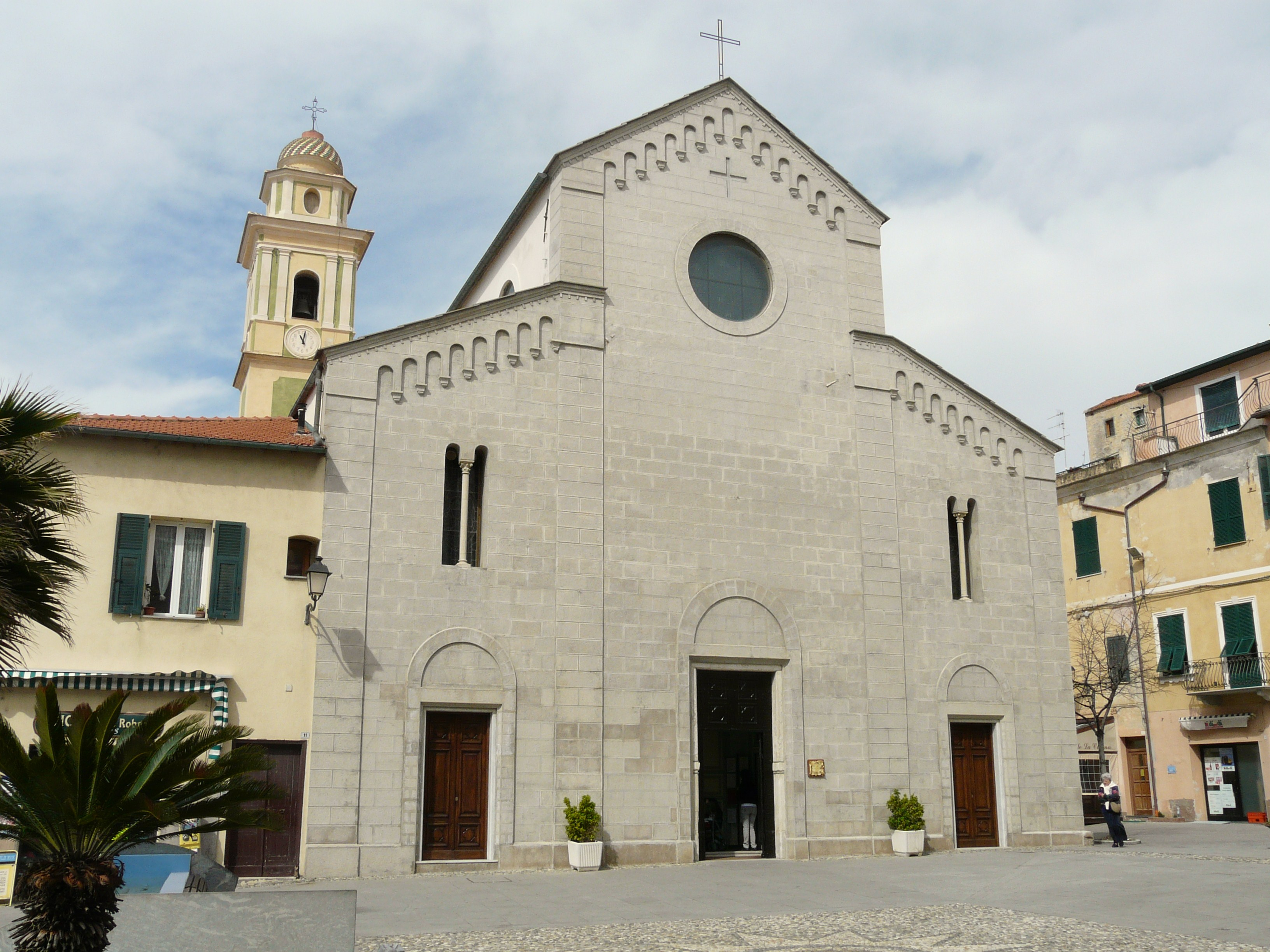 Chiesa di Santo Stefano, Santo Stefano al Mare, Liguria, Italia